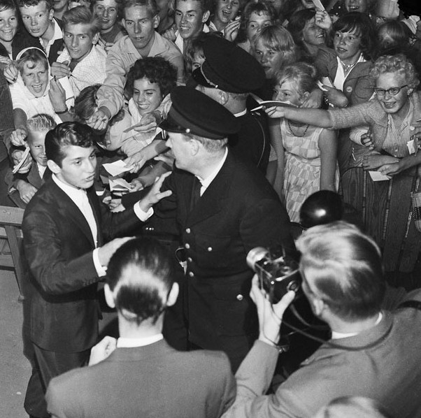 Gröna Lund. Kanadensiska rocksångaren Paul Anka uppträder på scenen. I publiken trängs ungdomar med autografblock